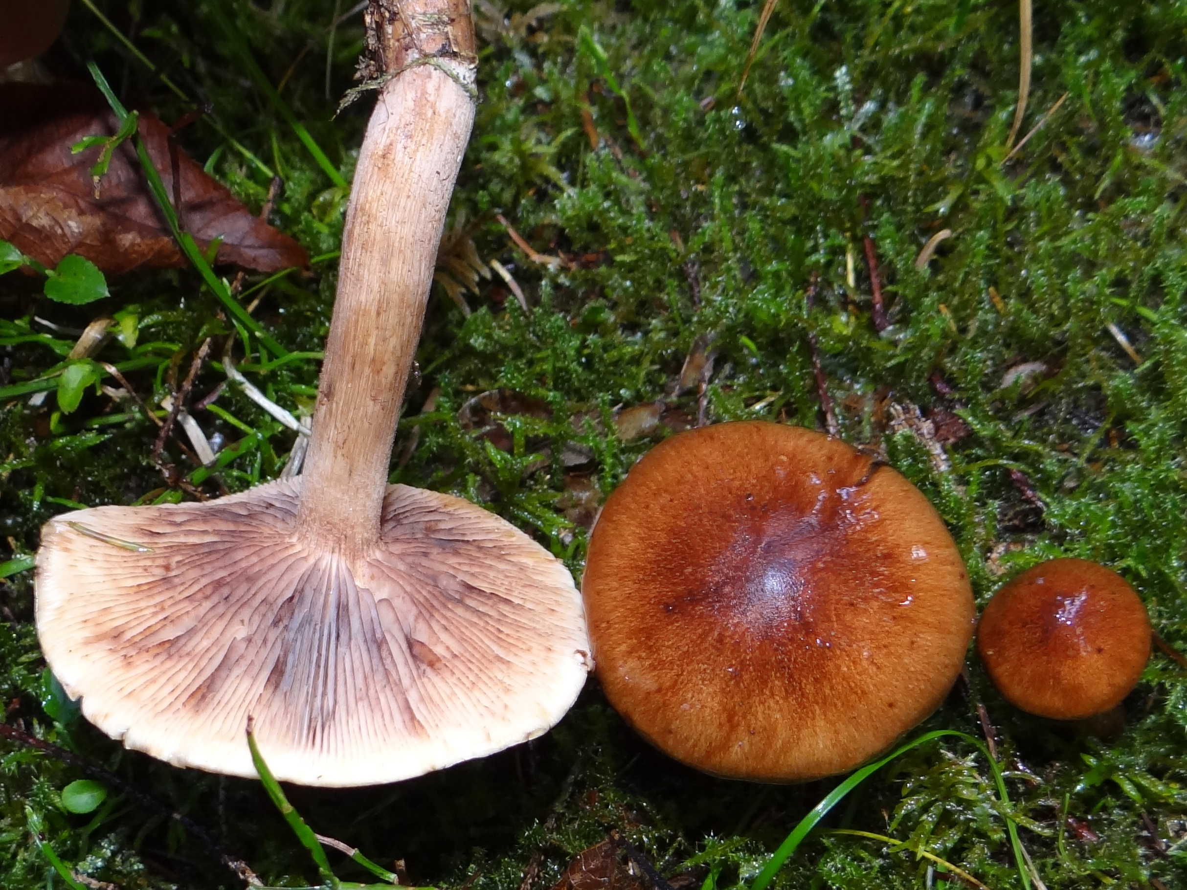 Tricholoma ustale